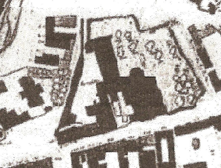 монастир кармелітів взутих (фрагмент плану укріплень монастиря кармелітів св. Леонарда)